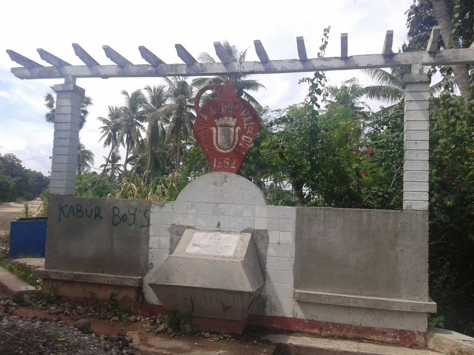 Atauro